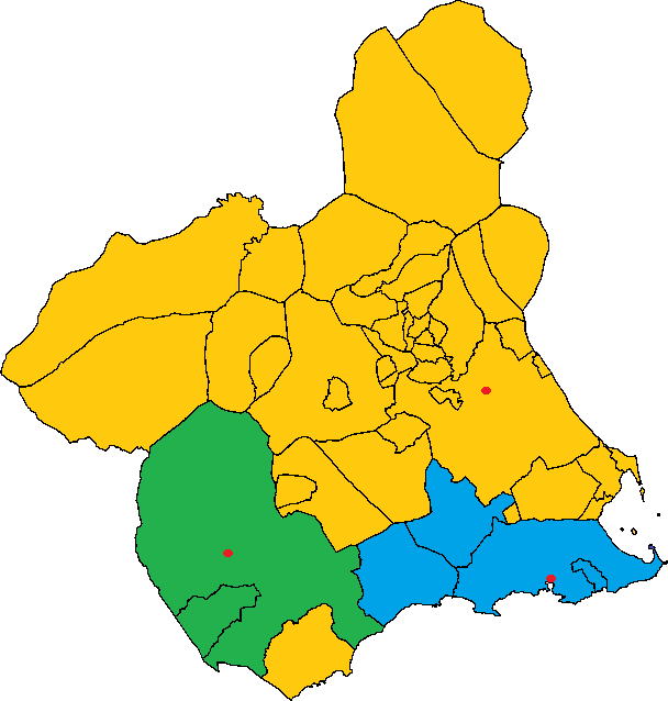 Situación y municipios de las Cámaras de Comercio en la Región de Murcia. - Cámara de Comercio, Industria y Navegación de Cartagena, situada en Cartagena, municipios en azul: Cartagena, La Unión, Mazarrón y Fuente Álamo. - Cámara de Comercio e Industria de Lorca, situada en Lorca, municipios en verde: Lorca y Puerto Lumbreras. - Cámara de Comercio, Industria y Navegación de Murcia, situada en Murcia, municipios en amarillo: resto de municipios de la Región de Murcia.